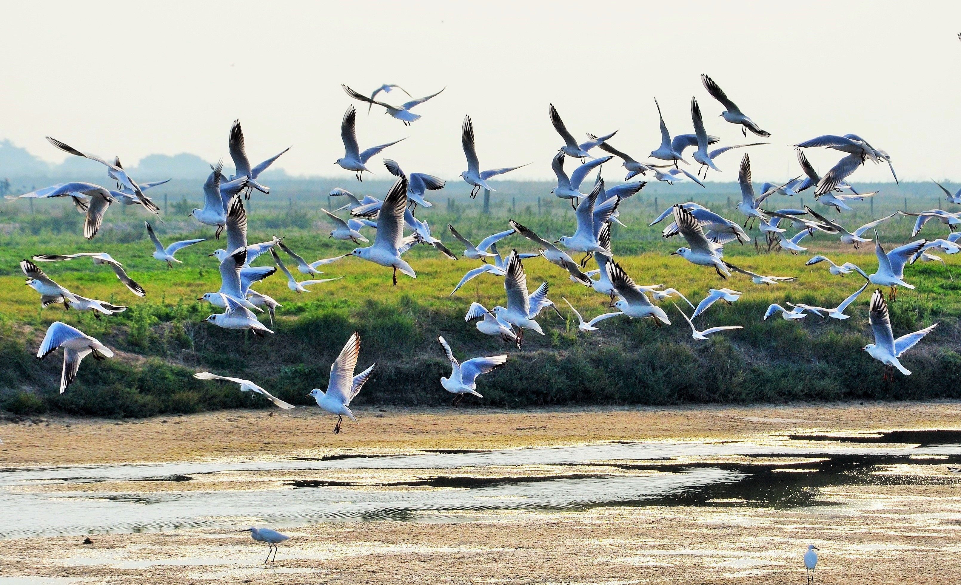 envol au petit matin , réserve naturelle ile de ré 17 ,sept 2014